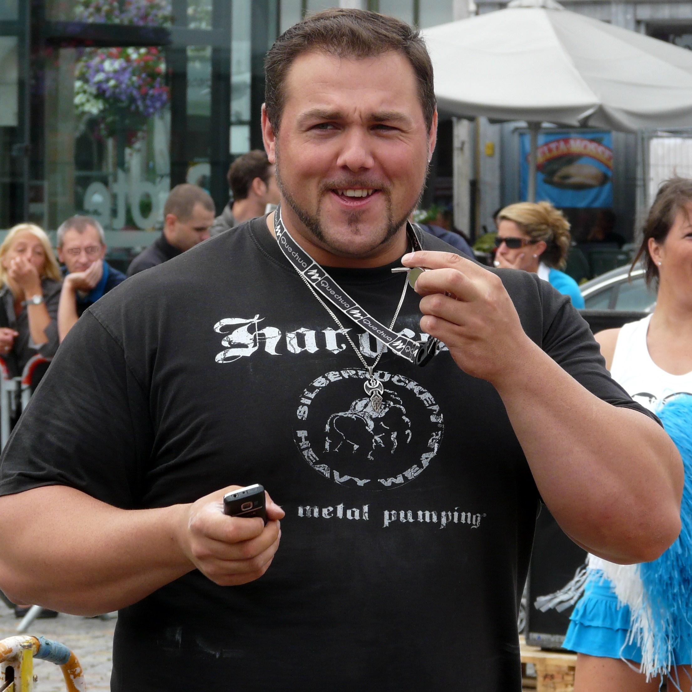 The strongest man of Belgium. Jimmy Laureys uit Sint-Pauwels is de sterkste man van België. Hij zit mee in de organisatie van de sterkste man van België en heeft er duidelijk plezier in, hier tijdens een wedstrijd op de Grote Markt in Mechelen. Gegevens van de website "sterkste man van België" : ° 1981 Gewicht: 150 kg Lengte: 193 cm Bovenarm : 54,5 cm Schouders : 216 cm Borst : 149 cm Niveau: internationaal Website: Beste lifts Squat : 330kg Dead lift : 360kg Bensch press : 220kg Log Lift : 165kg Farmers walk : 205kg , 15m / 160kg , 30m / 155kg, 45m / 120kg , 100m Atlas Stones : light set 14.55 sec , Heavy Set 28.36 sec En nu gijlie !